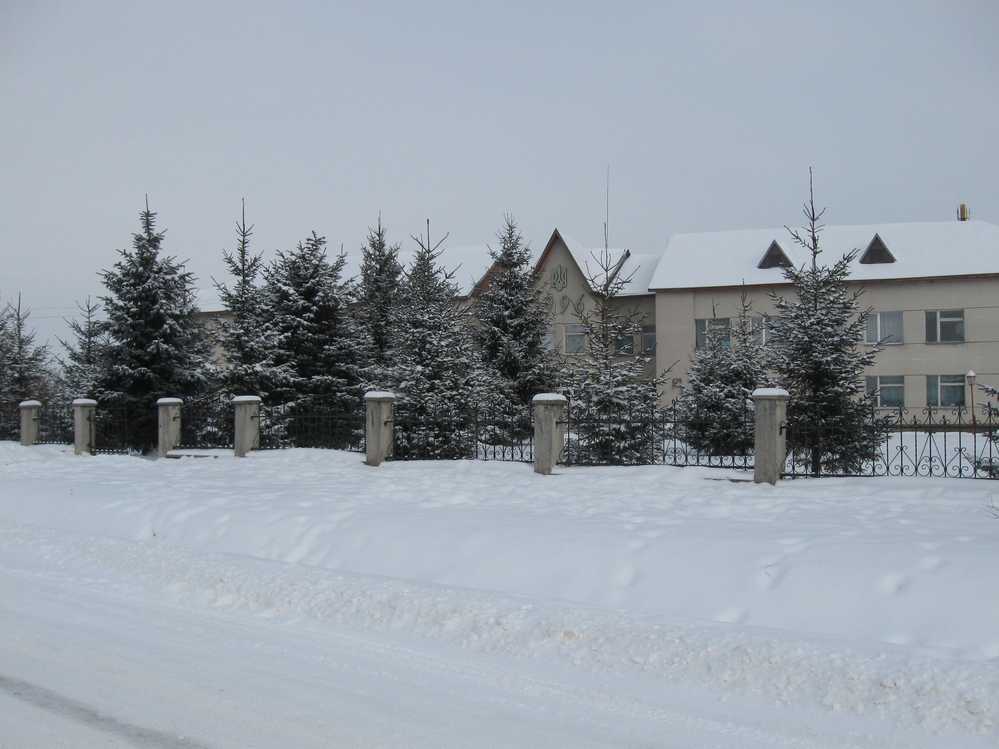 Капличка має давню історію, за легендами її збудовано після появи на цьому місце Пресвятої Богородиці почало бити джерело і після цього вже постала і капличка.